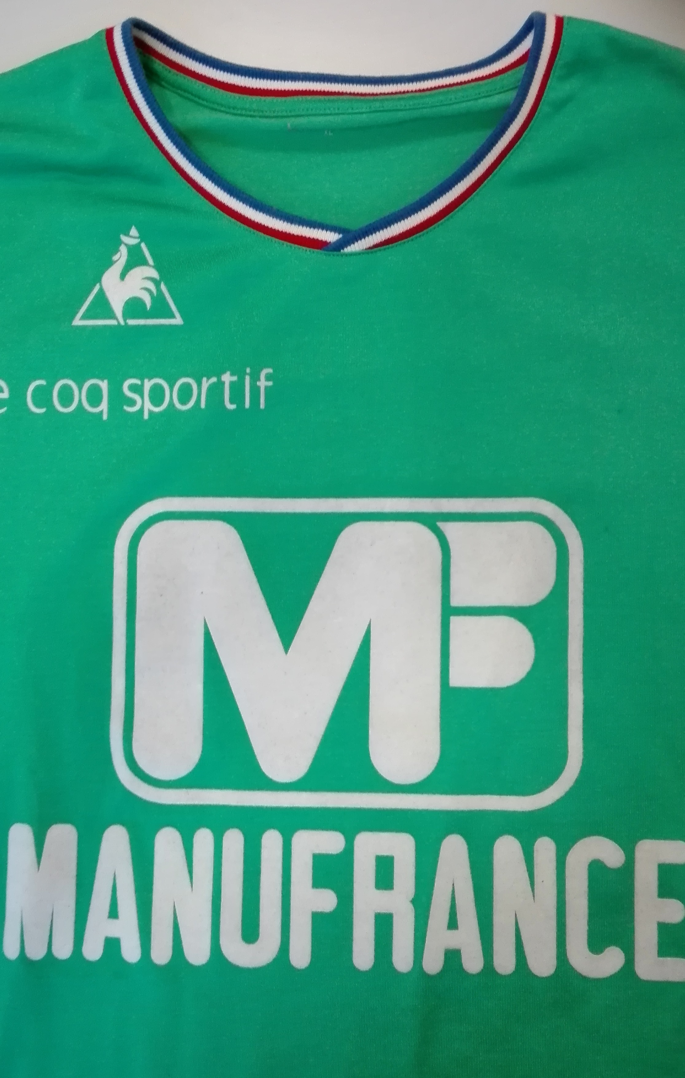 Maillot AS St Etienne champion de France 1976 avec liseré Bleu Blanc Rouge